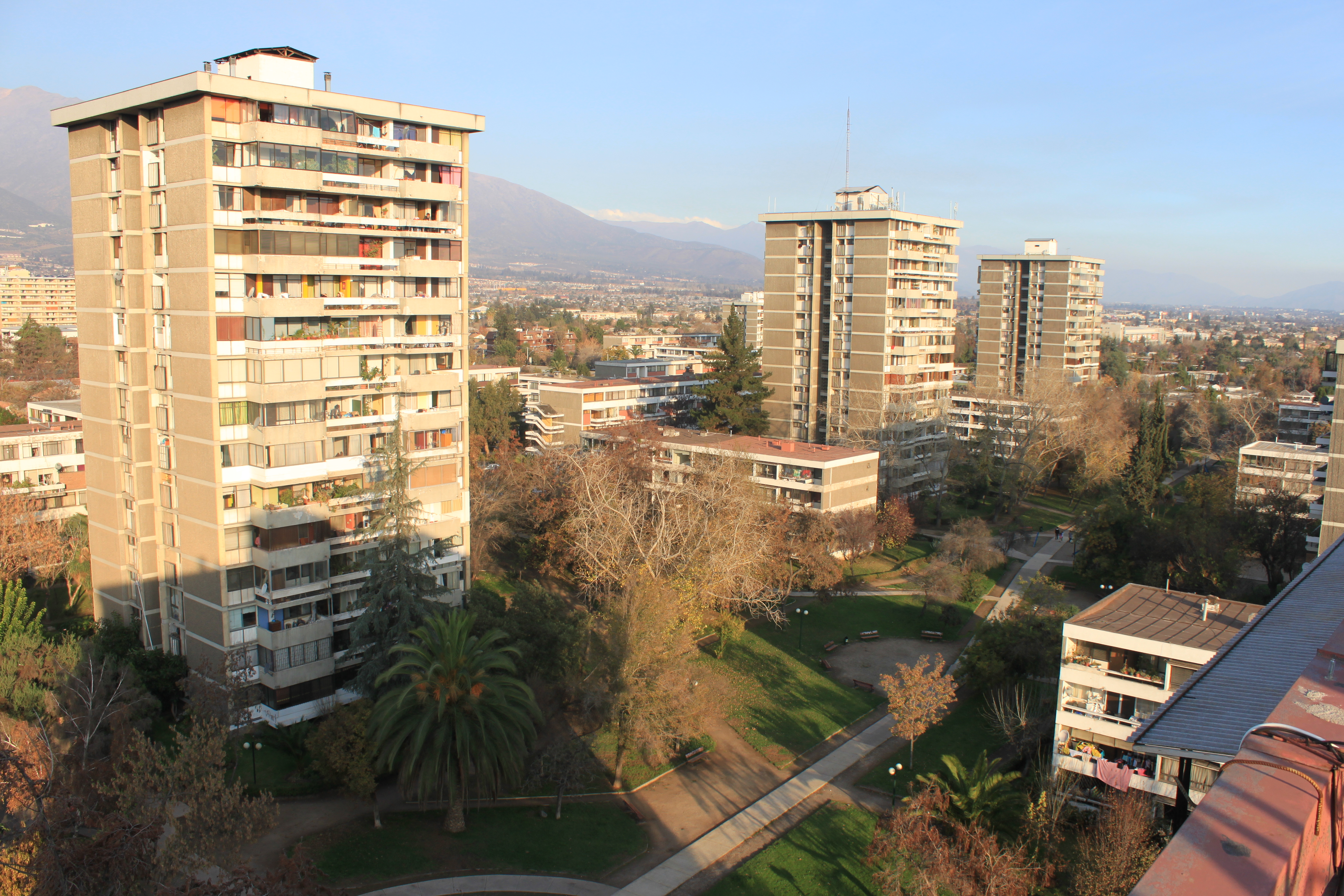 Vista aérea de las torres de 15 pisos en el parque Ramón Cruz. Conjunto habitacional Villa Presidente Eduardo Frei Montalva, comuna de Ñuñoa, Santiago de Chile